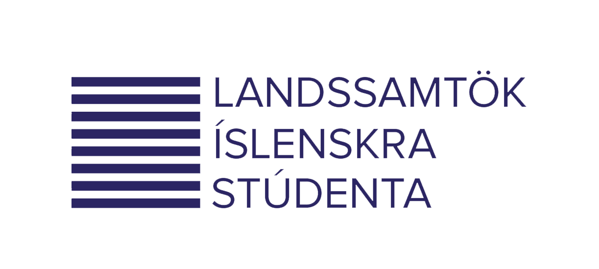 Merki Landssamtaka islenskra stúdenta